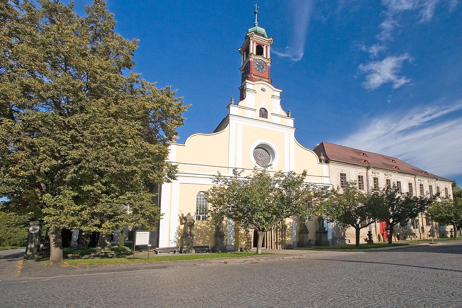 Police nad Metují - klášterní kostel Nanebevzetí Panny Marie